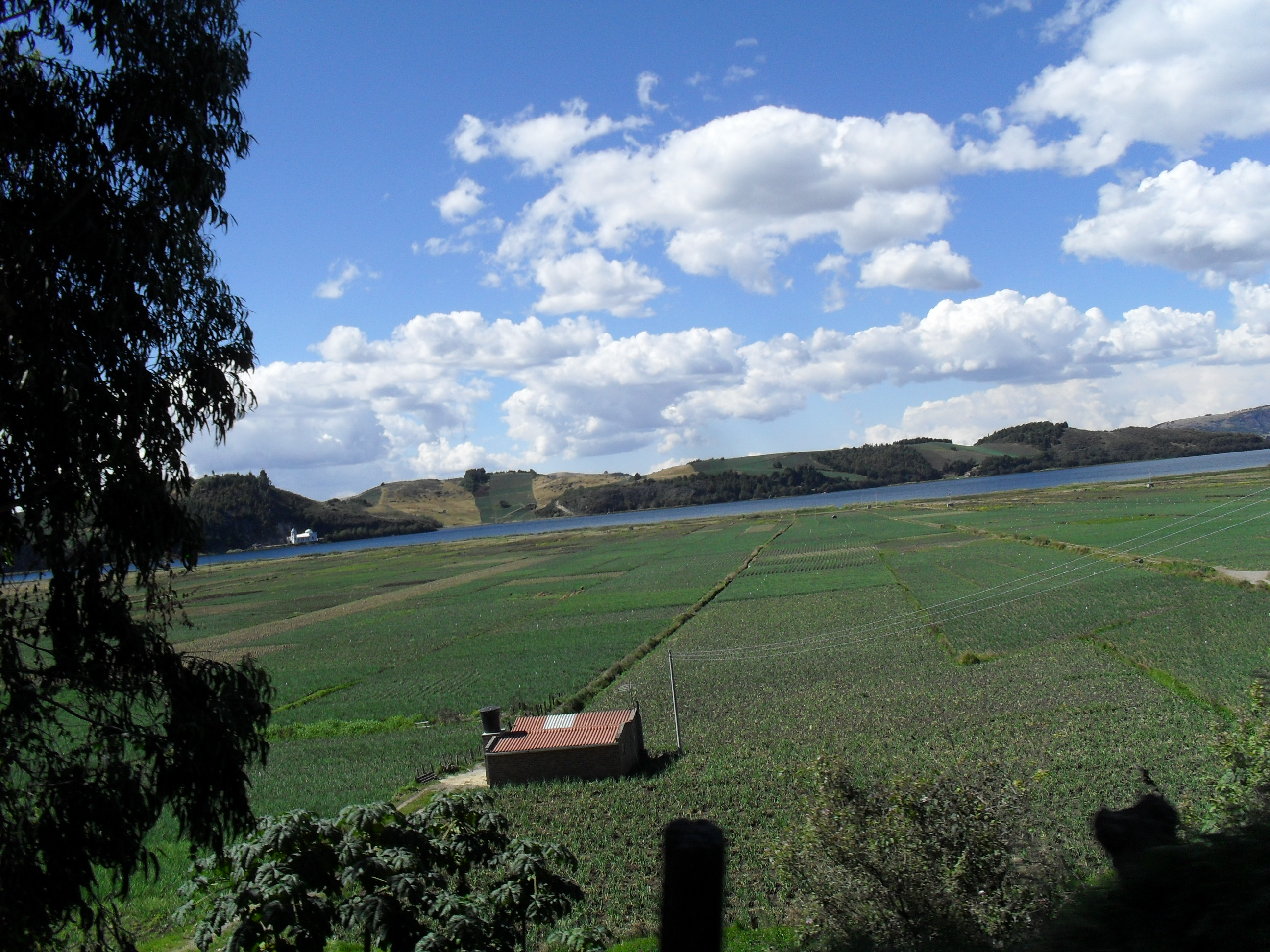 Cultivos de cebollas e las orillas de la laguna de Tota